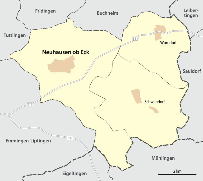 Karte der Ortsteile von Neuhausen ob Eck